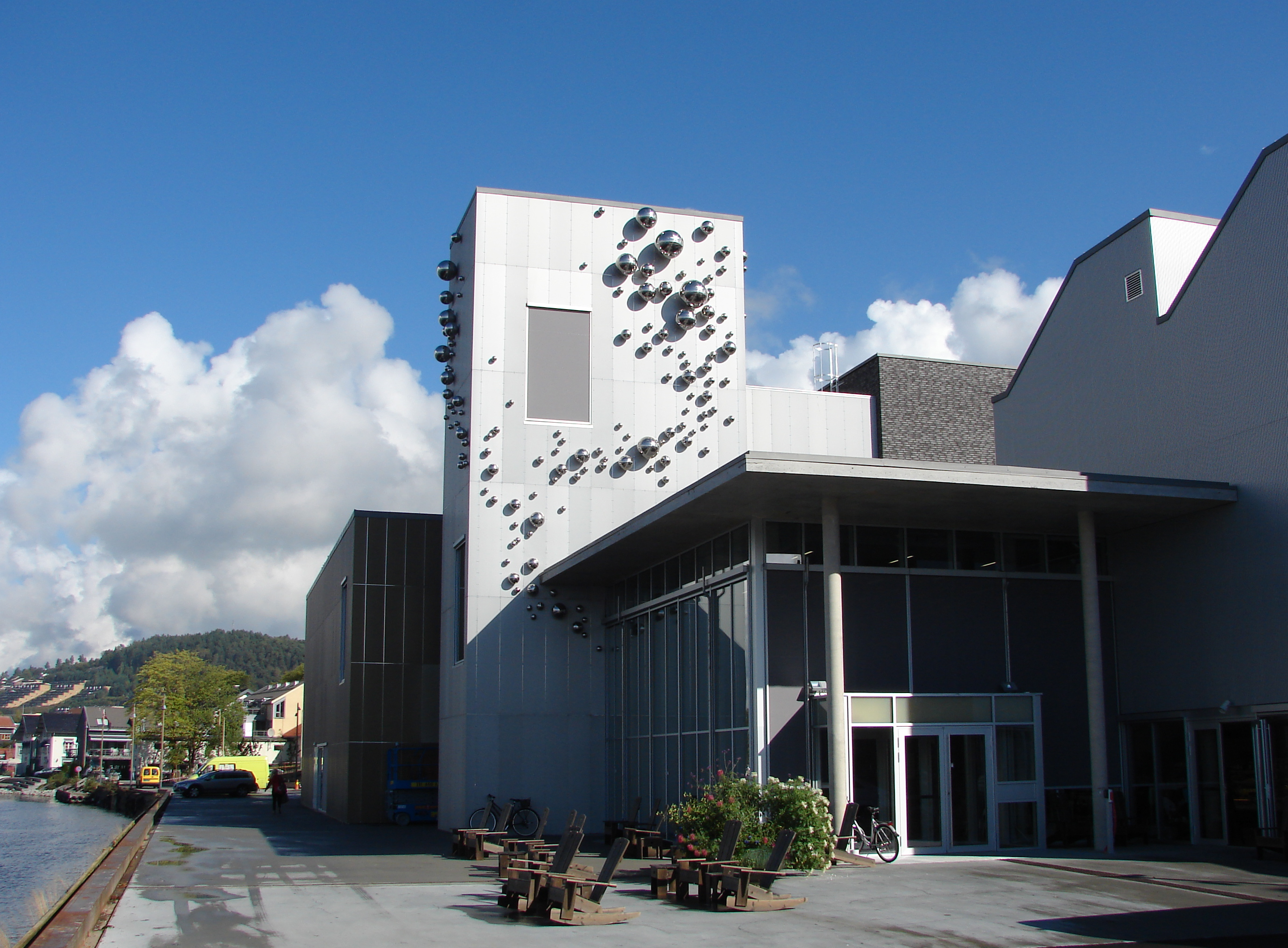 Ælvespeilet Kulturhus ved Skiens-/Porsgrunnselven i Porsgrunn, Norge